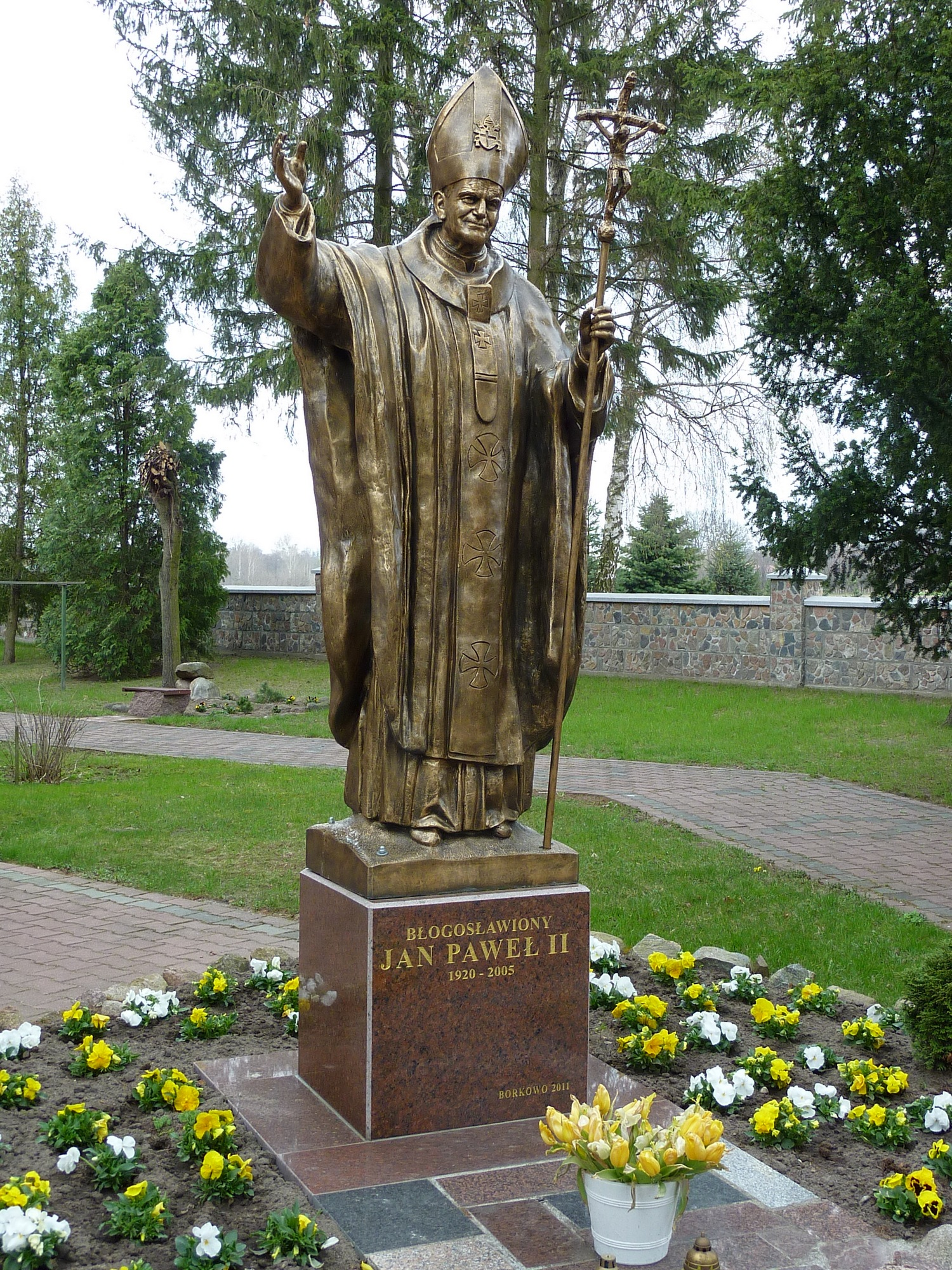 Pomnik Jana Pawła II przed kościołem św. Apolonii w Borkowie Kościelnym.